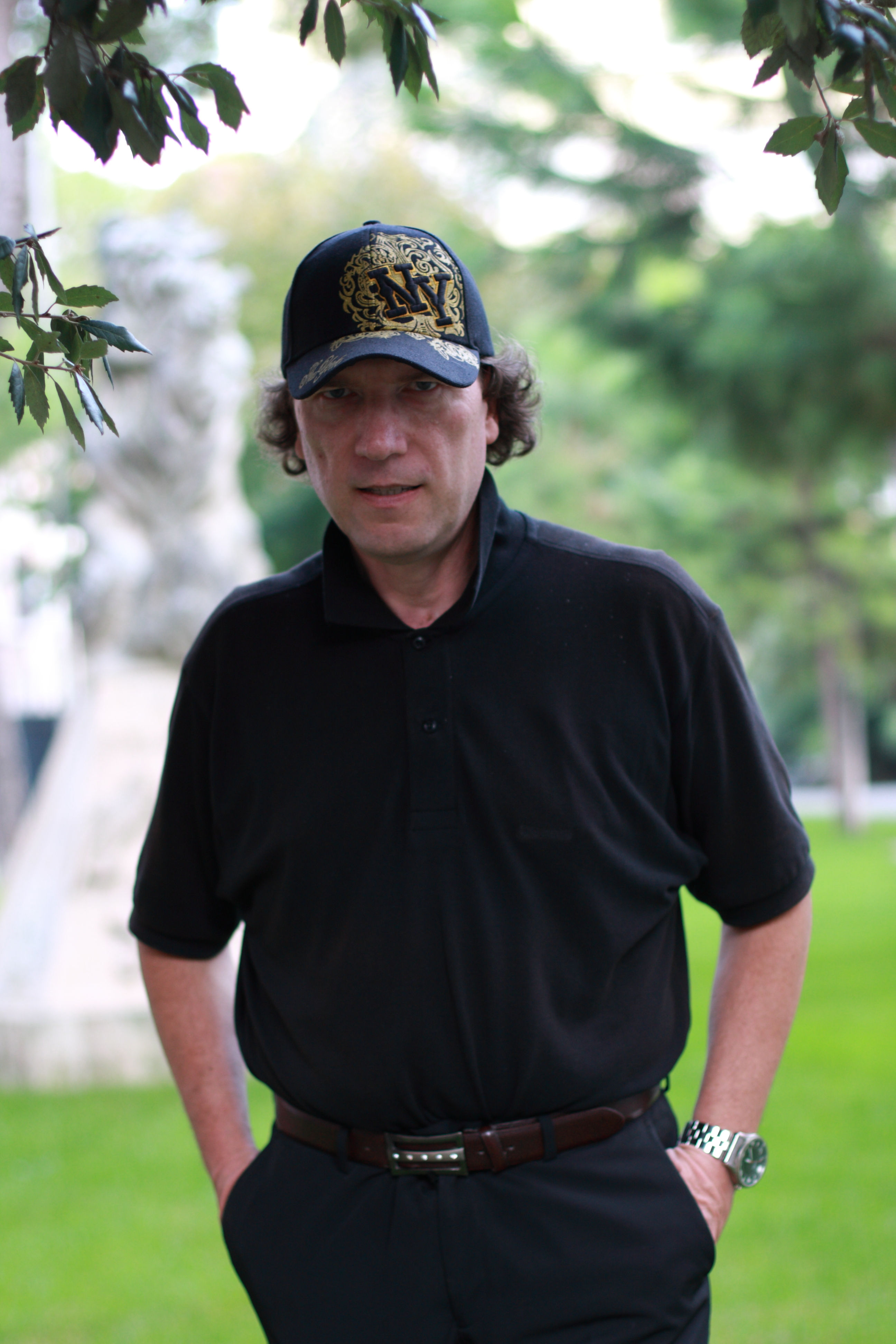 Giuliano Cotellessa a Roma nel 2010